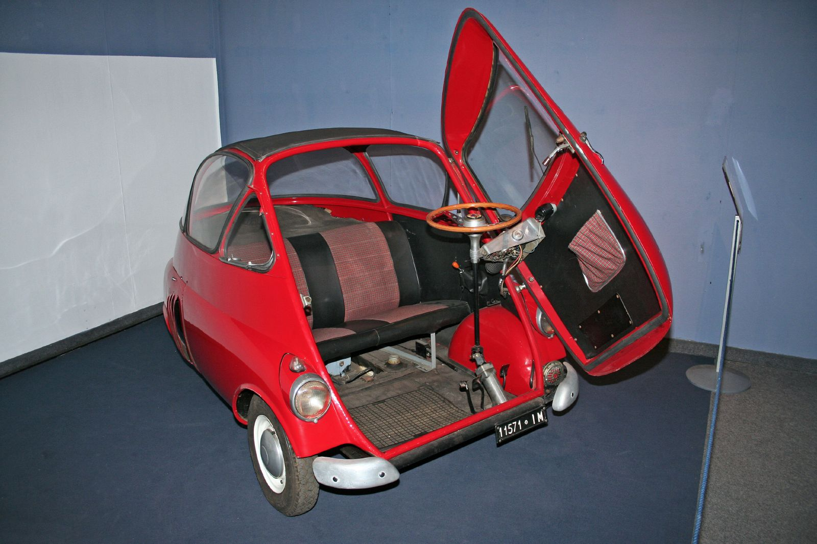 Iso Isetta 200 del 1953